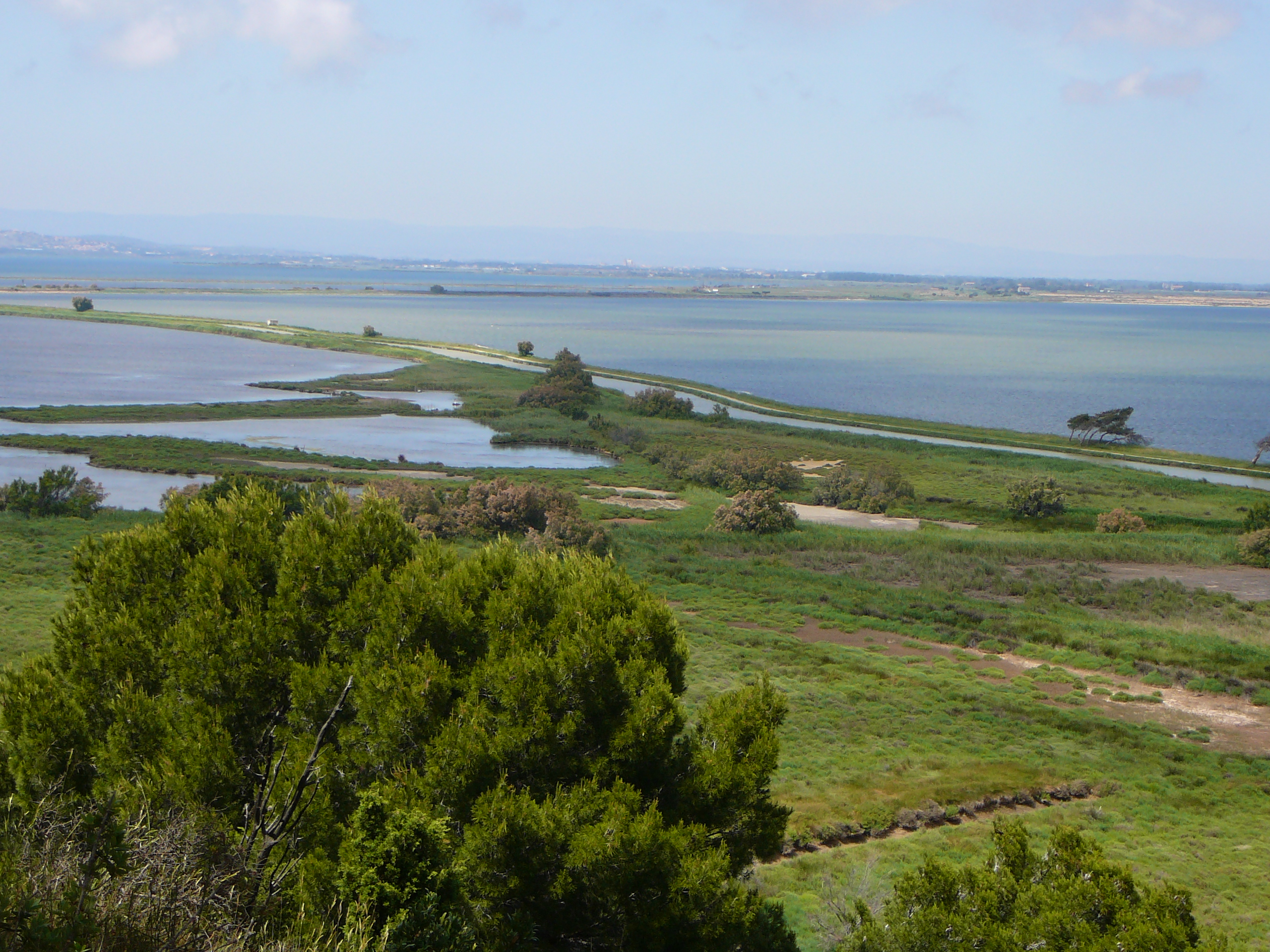 Vue sur l'étang de Bages depuis l'île Sainte-Lucie à Port-la-Nouvelle (photo personnelle de Joyce11).